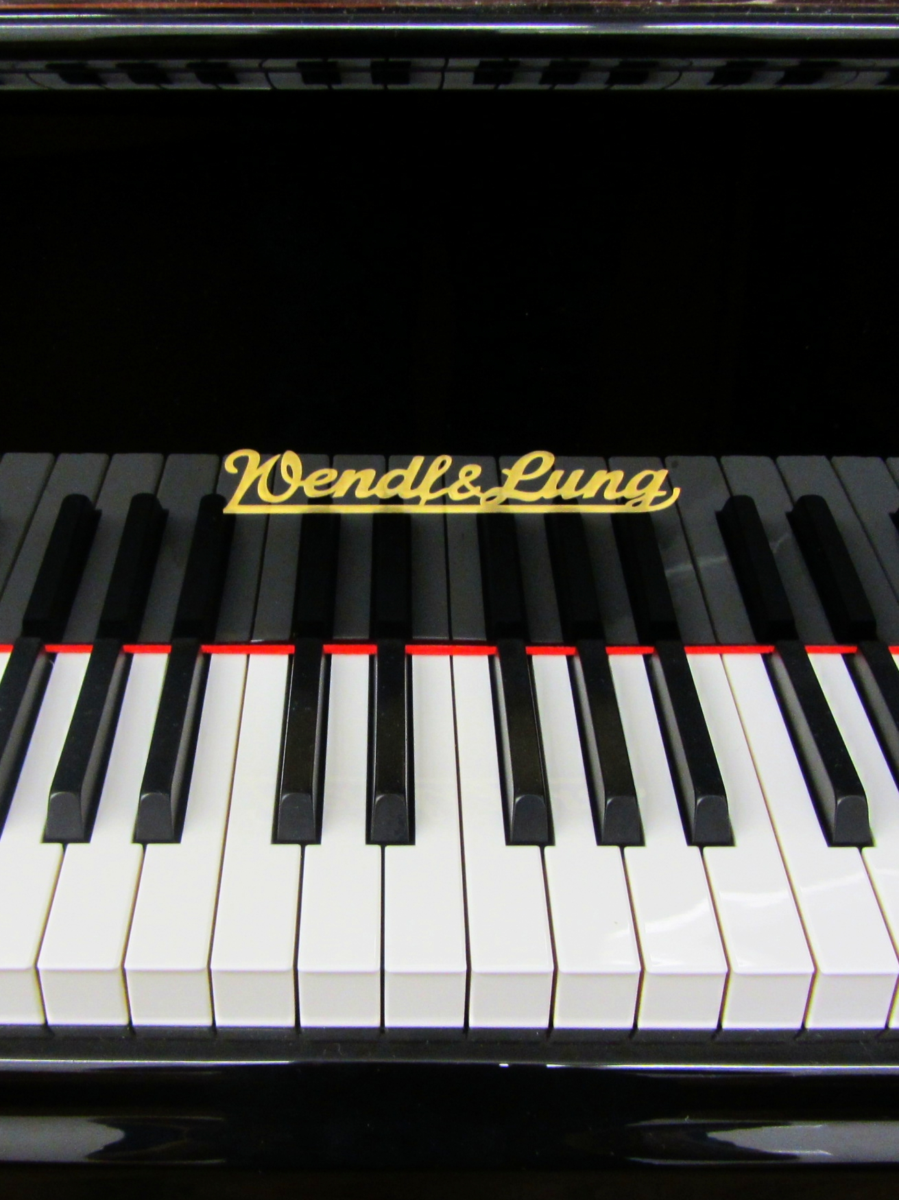 Wendl & Lung Grand Piano keyboard